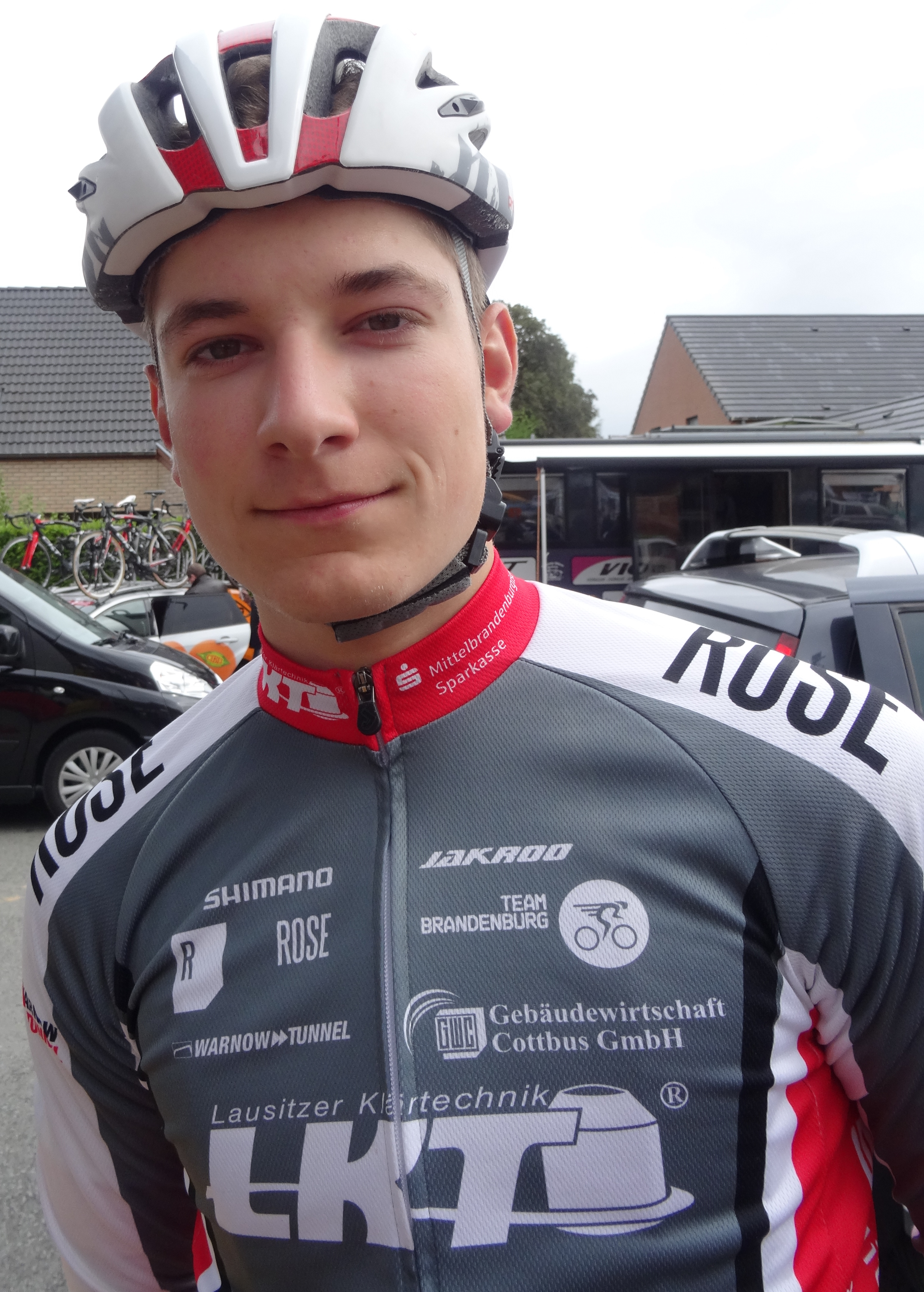 Reportage photographique réalisé le samedi 30 août à l'occasion du départ et de l'arrivée du Grand Prix des commerçants de Templeuve 2014 à Templeuve (Tournai), Belgique.